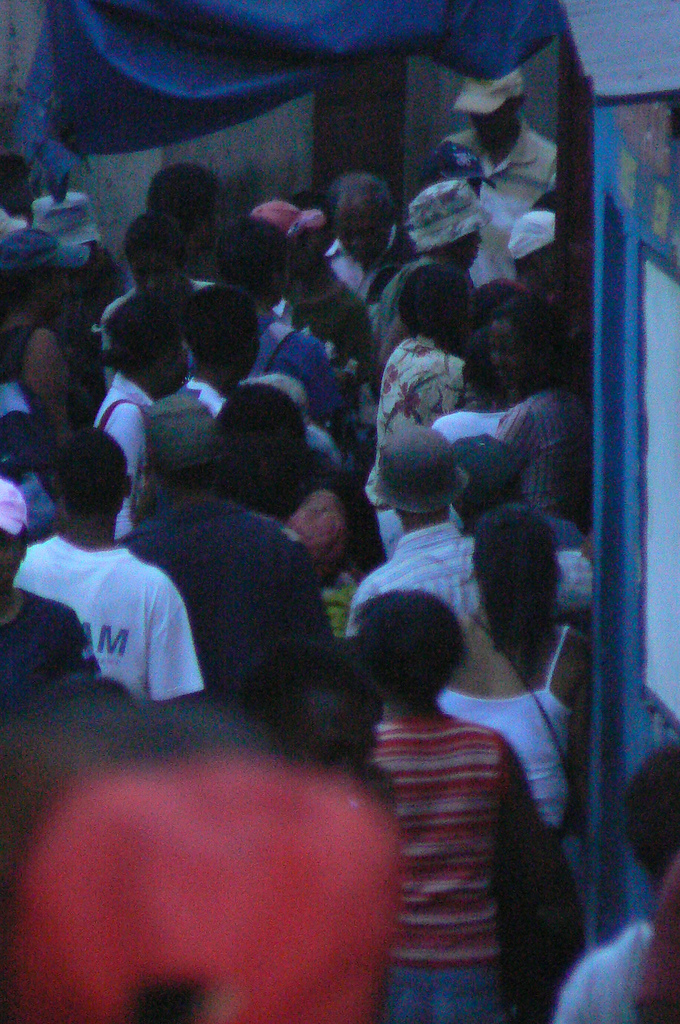 2009 protests in Antananarivo, Madagascar